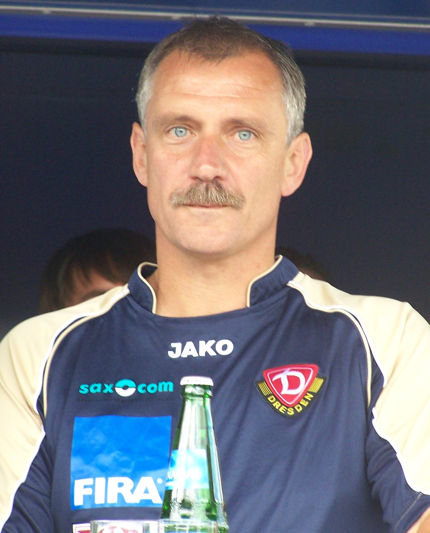 Trainer Ruud Kaiser bei der Teampräsentation von Dynamo Dresden zum Start der Drittliga-Saison 2008/09